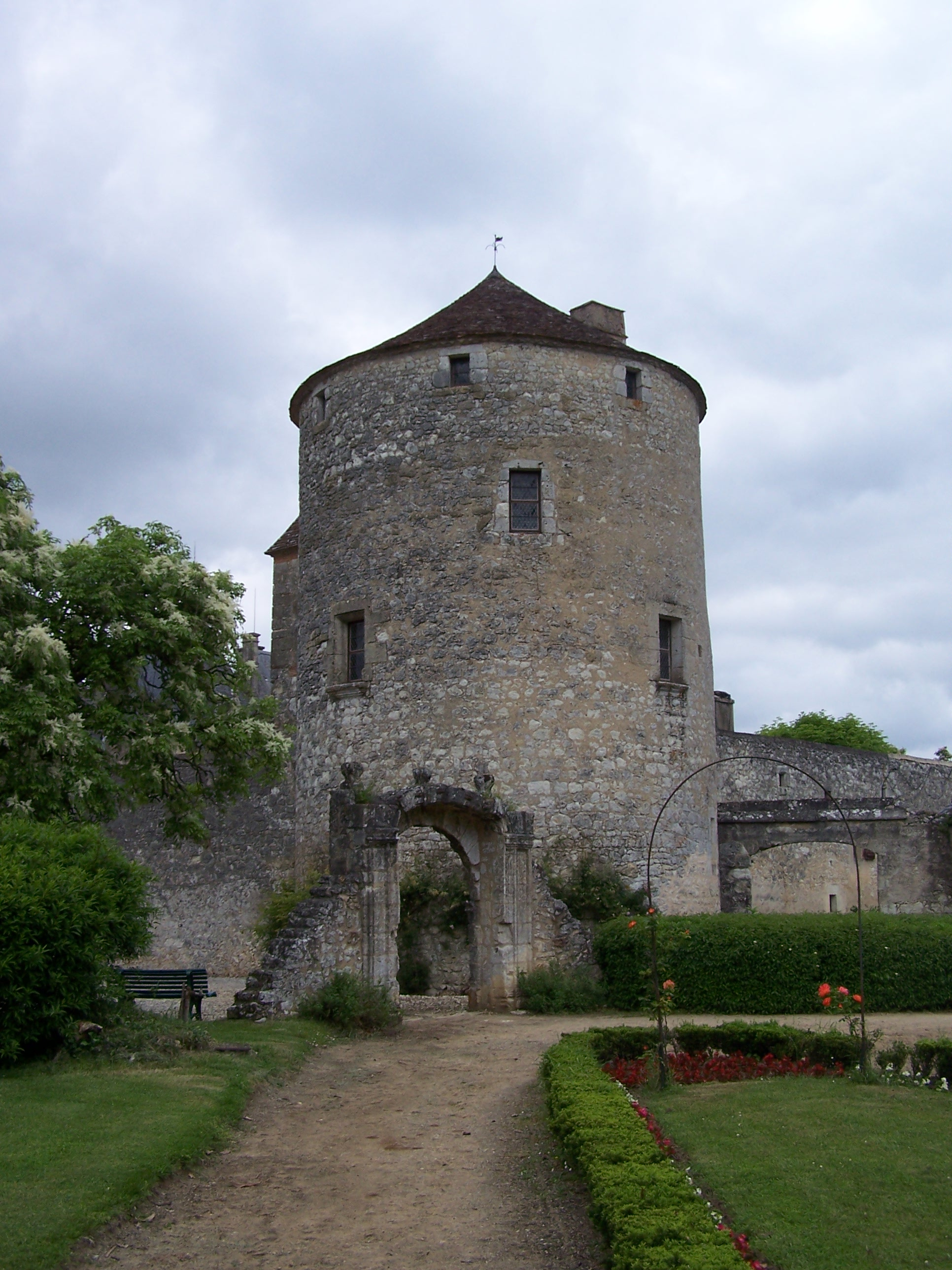 Tour de Montaigne à Saint-Michel-de-Montaigne, Dordogne, France